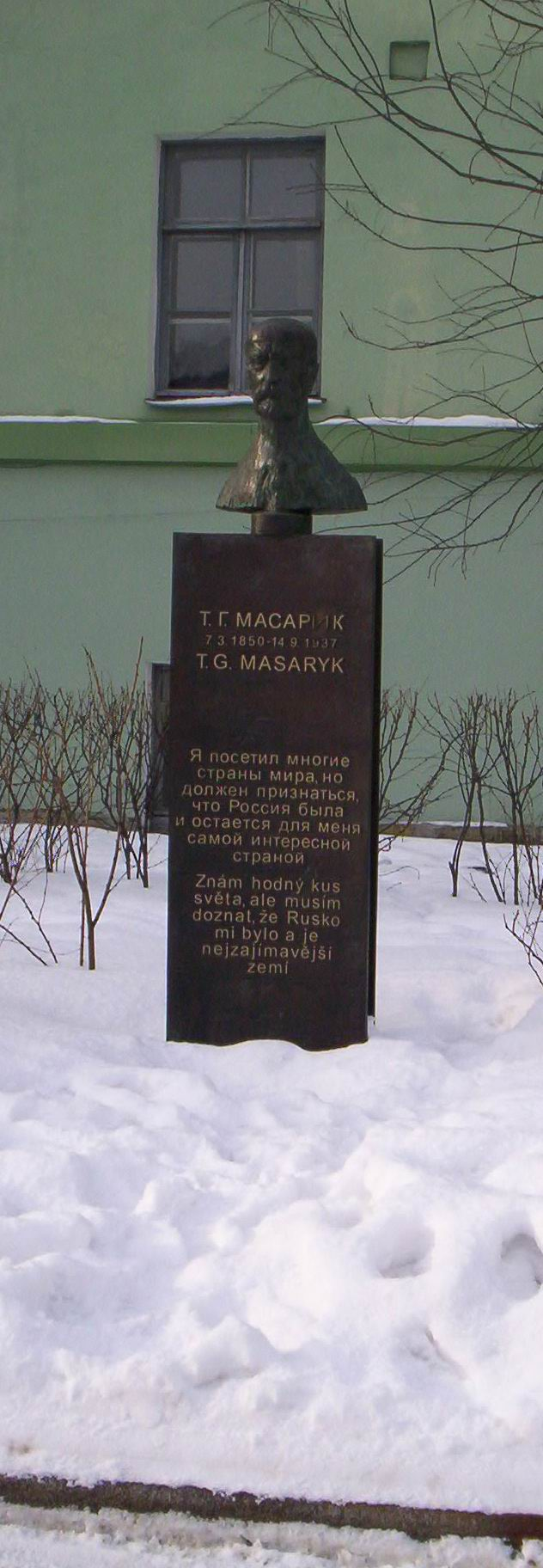 Pomník Tomáši Garrigue Masarykovi na nádvoří filologické fakulty Petrohradské univerzity v únoru 2006. eo: Monumento al T. G. MASARYK en la korto de la filologia fakultato de Peterburga Universitato. Fotita en februaro de 2006. ru: Памятник Т. Г. Масарику во дворе филологического факультета СПбГУ. Фотография сделана в феврале 2006 г.